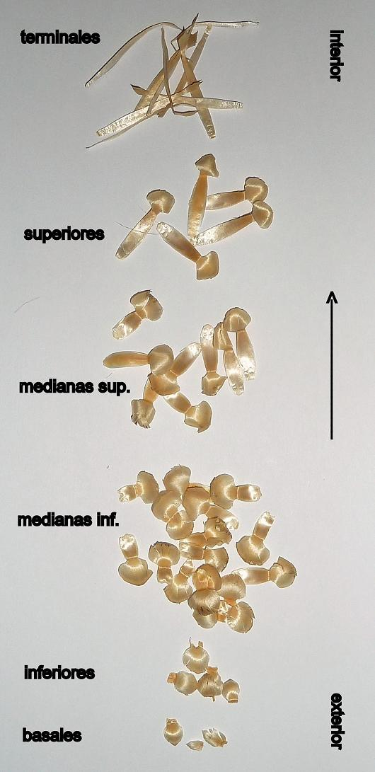 Rhaponticum coniferum (Cuchara de pastor) : Los distintos tipos de brácteas involucrales - Procedencia: Sierra de Degollados/Altamira (Cuenca, España), 25-07-1981.